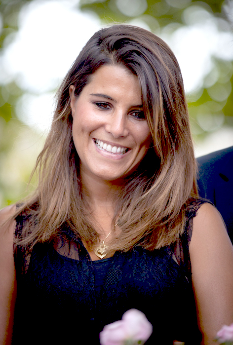 Karine Ferri durant la Saint Fiacre 2015 à Saint Marceau